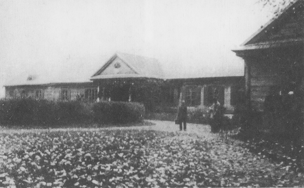 Беларуская (тарашкевіца): Замосьце, сядзібны дом Аляксандра Ельскага